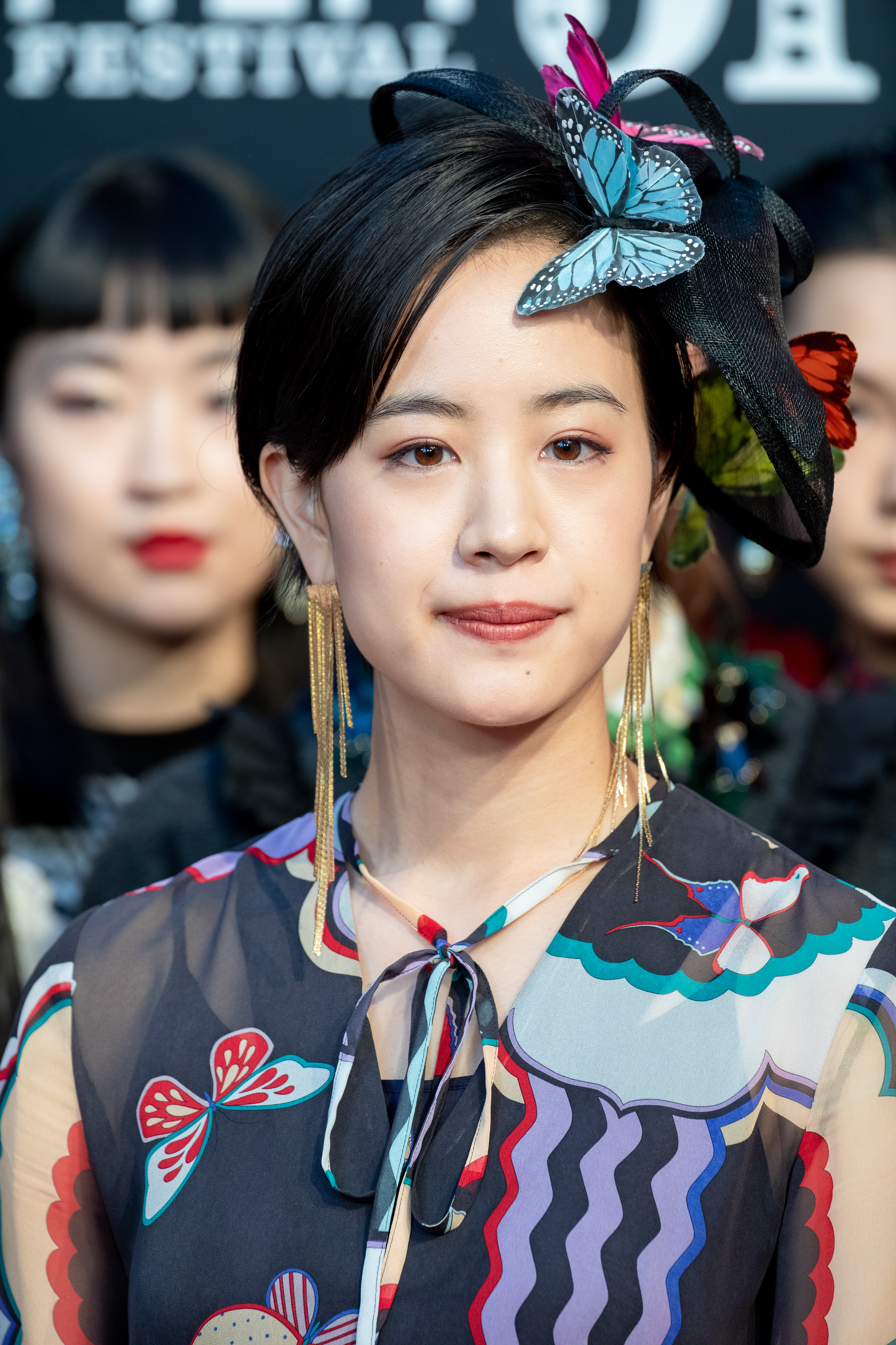 第30回 東京国際映画祭 オープニングセレモニー 石橋静河 (21世紀の女の子)